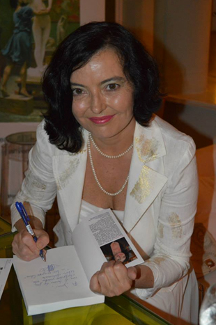 Fotografía de la escritora Rocío Castrillo